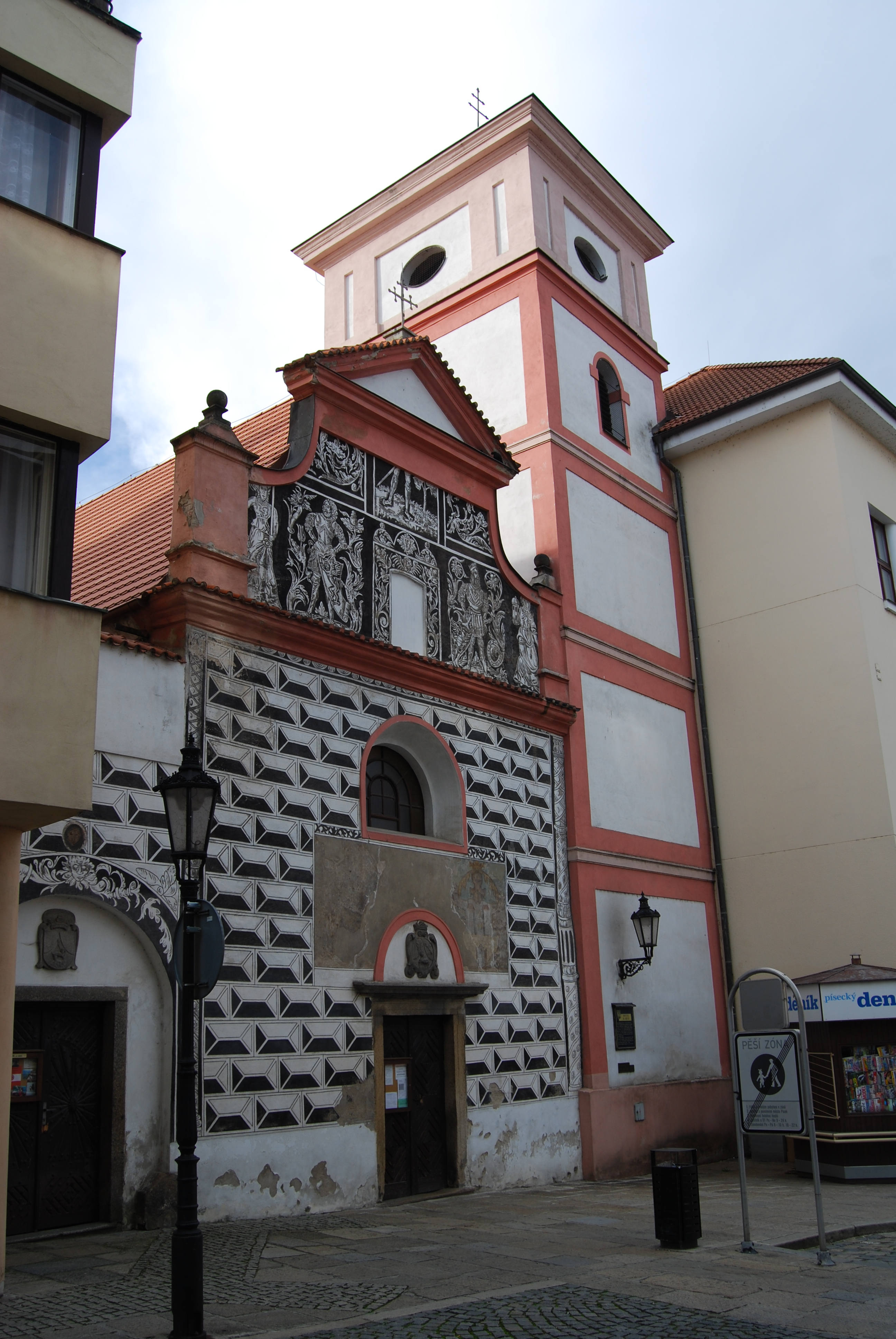 Kostel Povýšení Svatého Kříže. Velké náměstí. Písek. Česká republika.